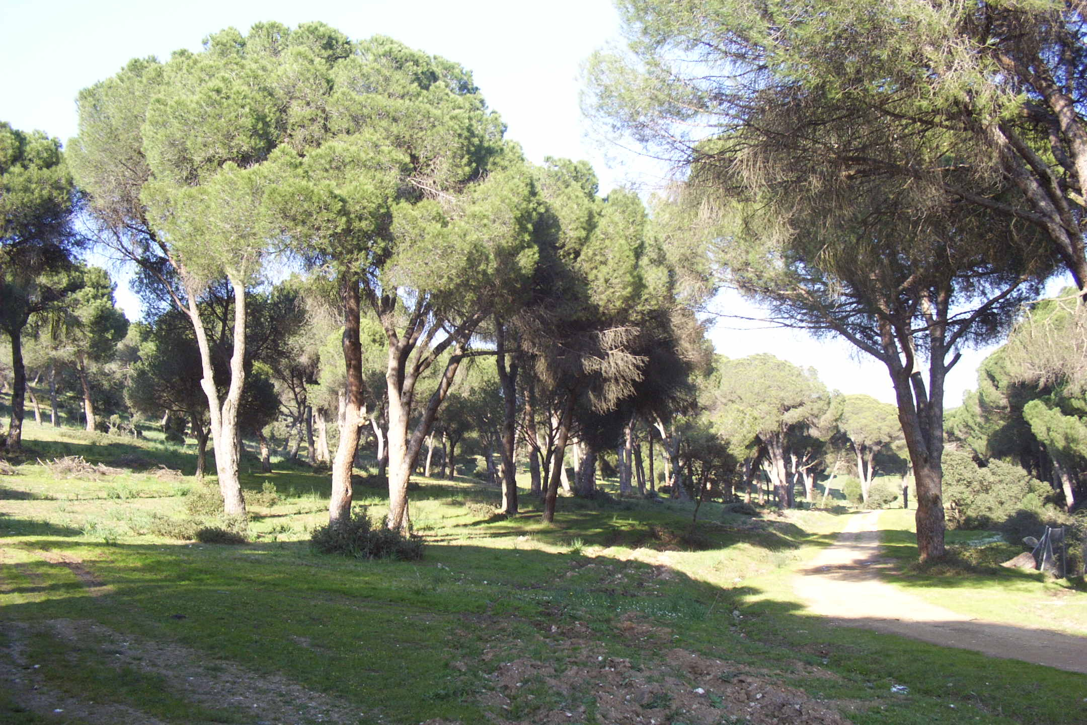 Pinar de Almorox, Toledo (España)